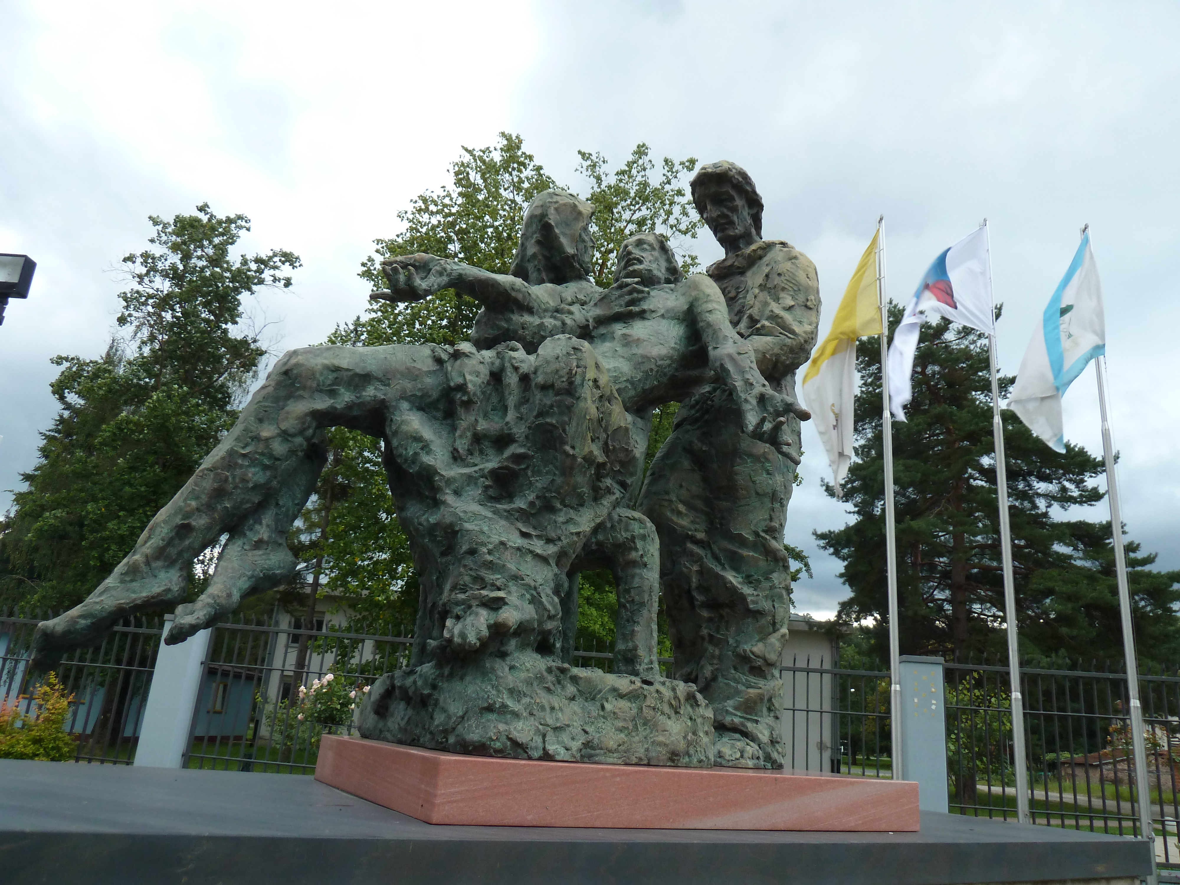 Wallfahrtskirche "Zu Unseren Lieben Frau"